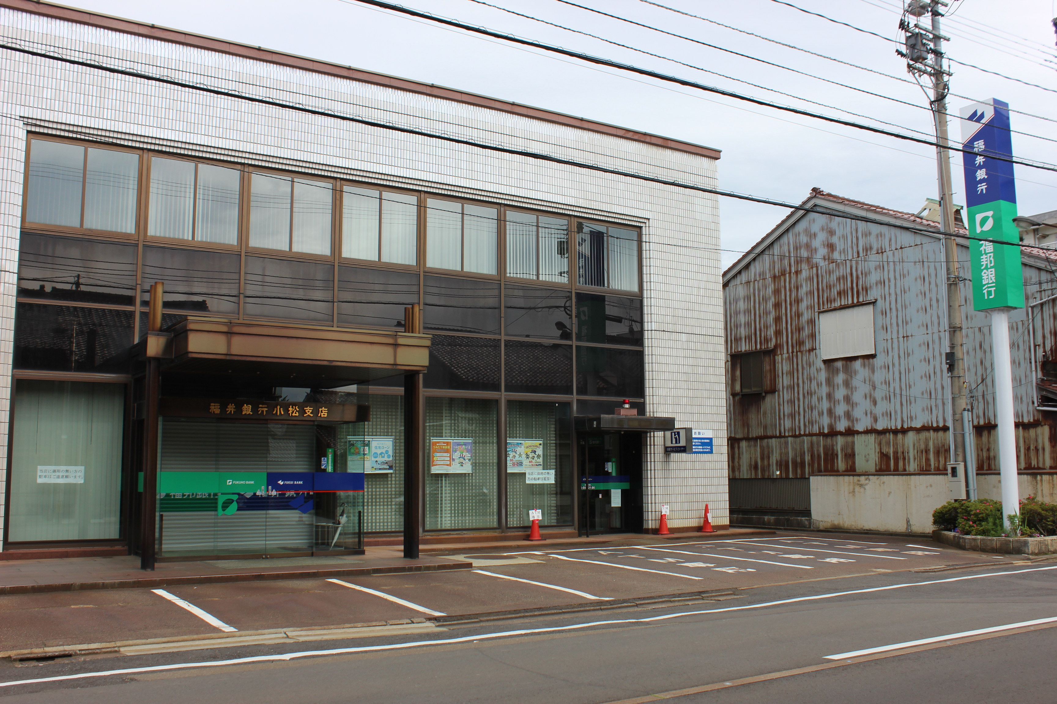 福井銀行小松支店（石川県小松市）、福邦銀行小松支店もここに入居している。 Canon EOS Kiss X5